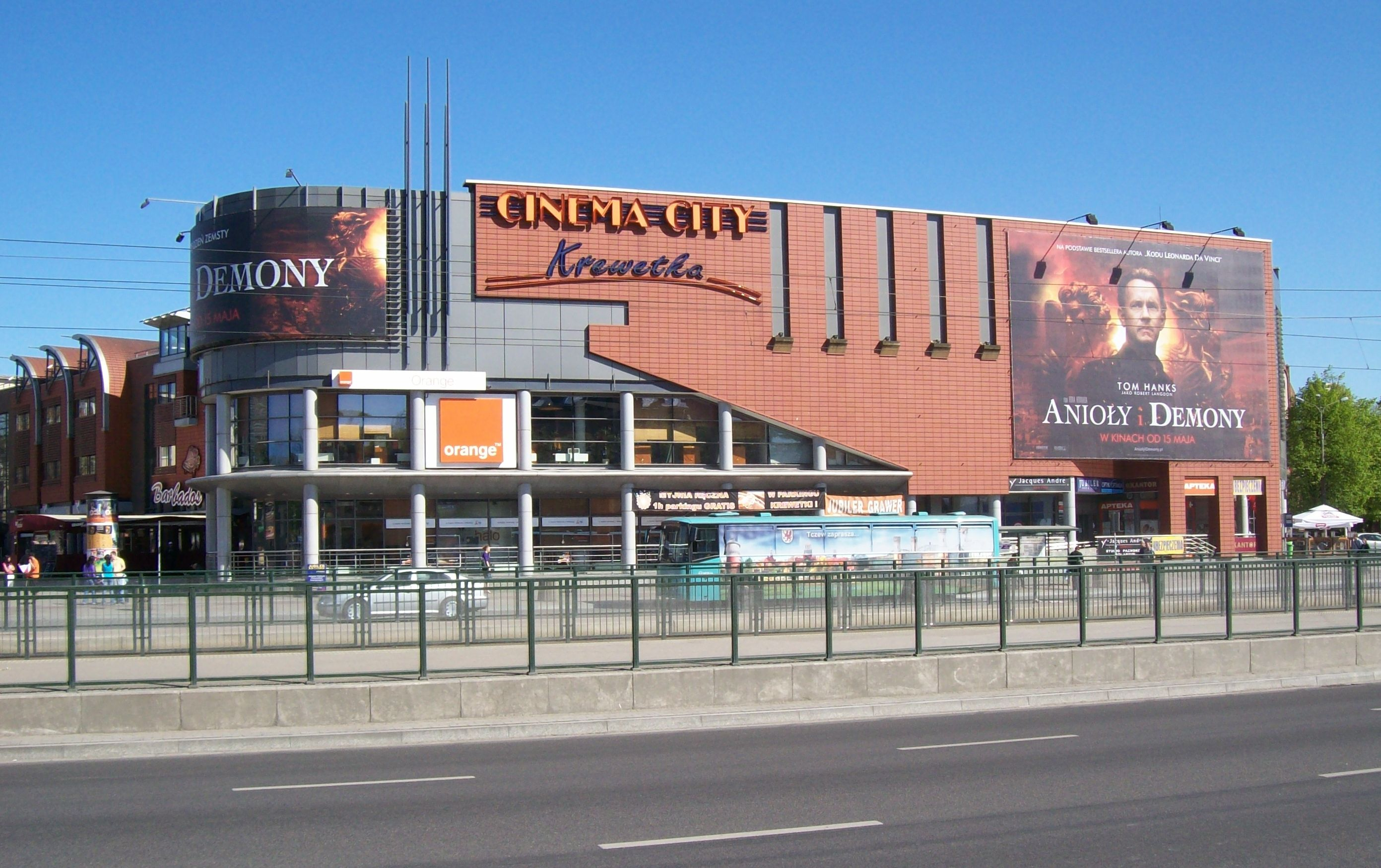 Multipleks Cinema City w Gdańsku (ul. Karmelicka 1), na pierwszym planie ul. Podwale Grodzkie.